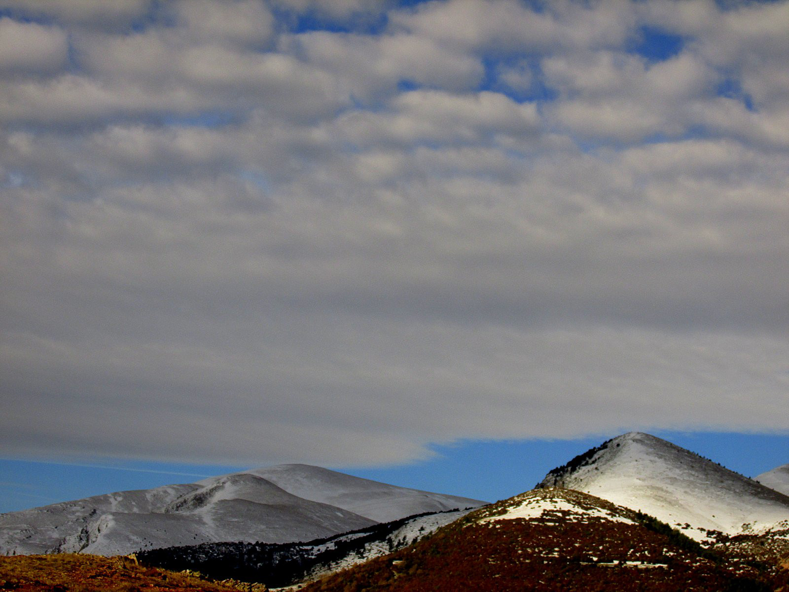 Tossall d'Orriols a la dreta de l'imatge